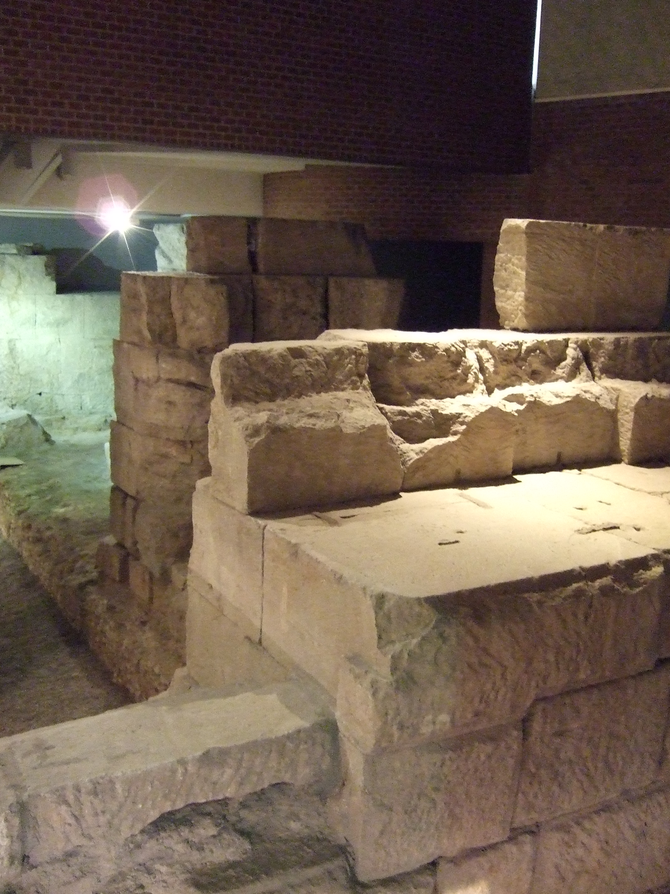 Zaragoza_-_Museo_Puerto_Fluvial_-_Ruinas